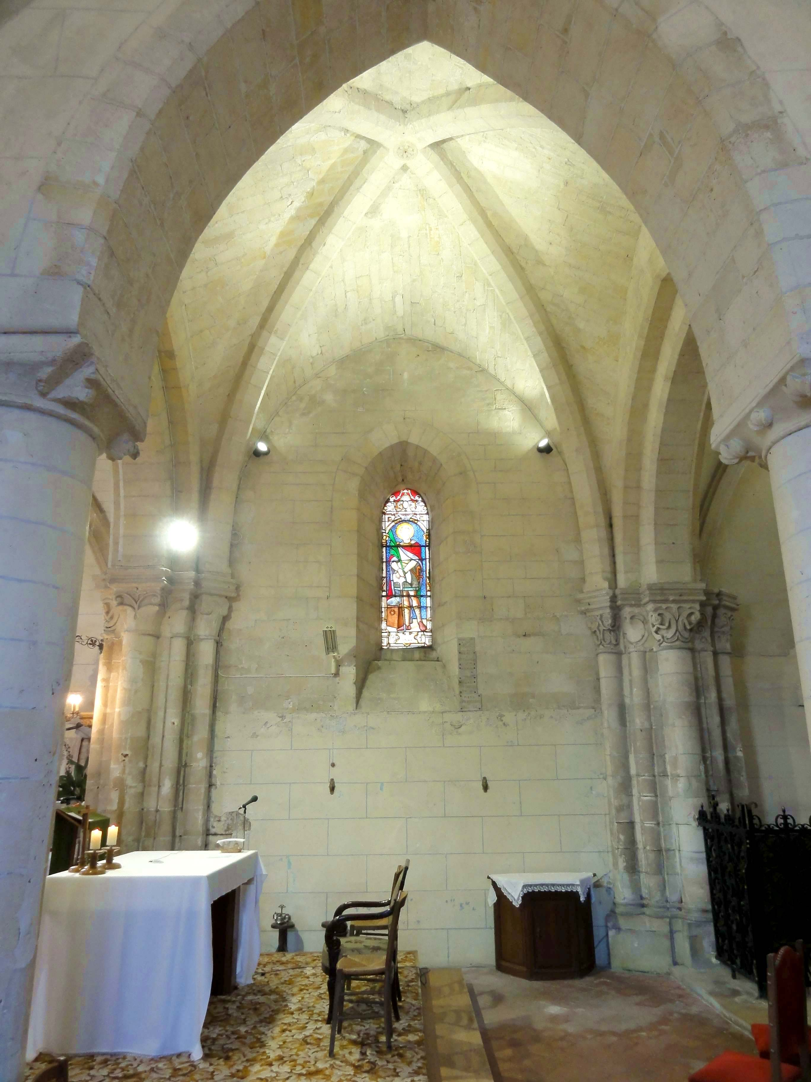 Intérieur de l'église (voir titre).